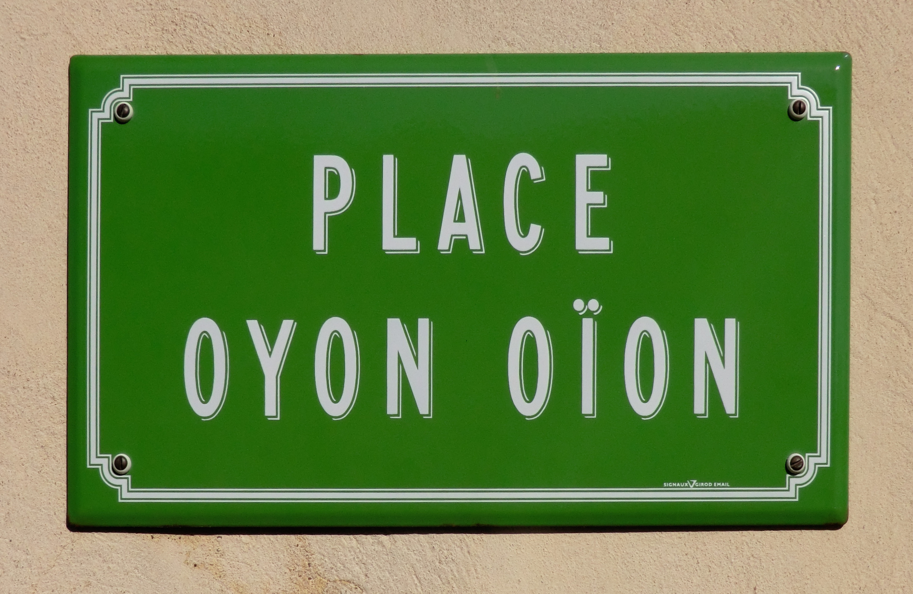 Place Oyon Oïon (S.aint-Martin-de-Seignanx)